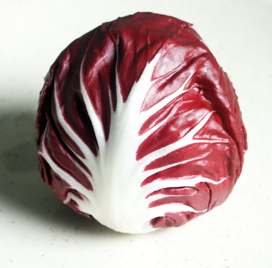 Salade Trévisane ou Trévise, dite "salade rouge" - Récolte 2006